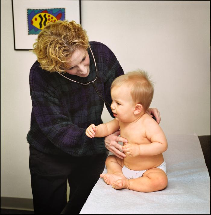 This photograph depicts a physician examining a 9mo. old infant. This physician is examining an infant during his nine-month old checkup. Regular checkups are a way to monitor an infant’s health and development.